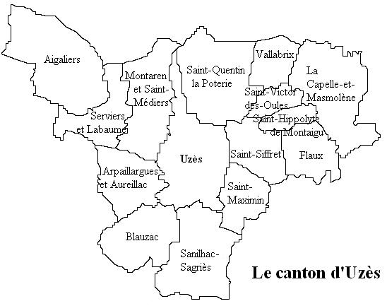 Le canton d'Uzès Image personnelle